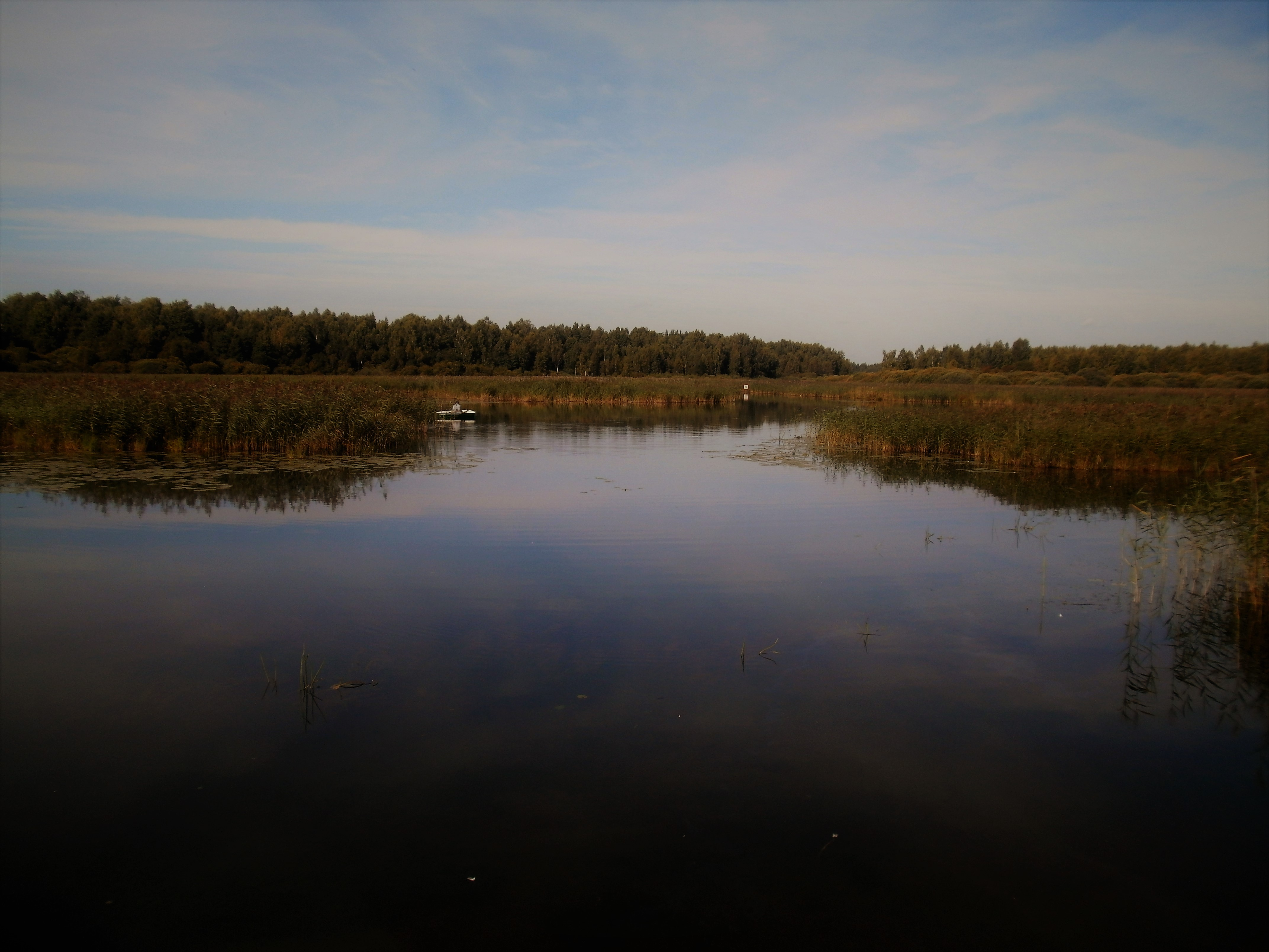 Vaade Roosisaare rippsillalt loodesse Vahejõele, mis viib Tamulast Vagula järvele ja Võhandu uude jõesängi.